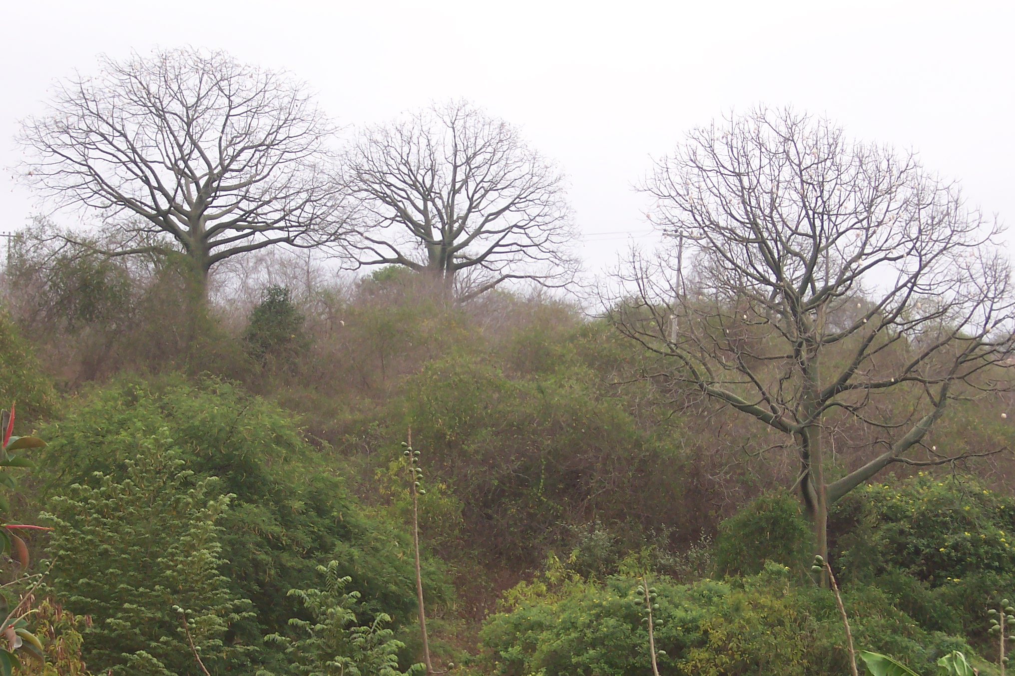 Bosque semiarido en la península de Santa Elena - Ecuador